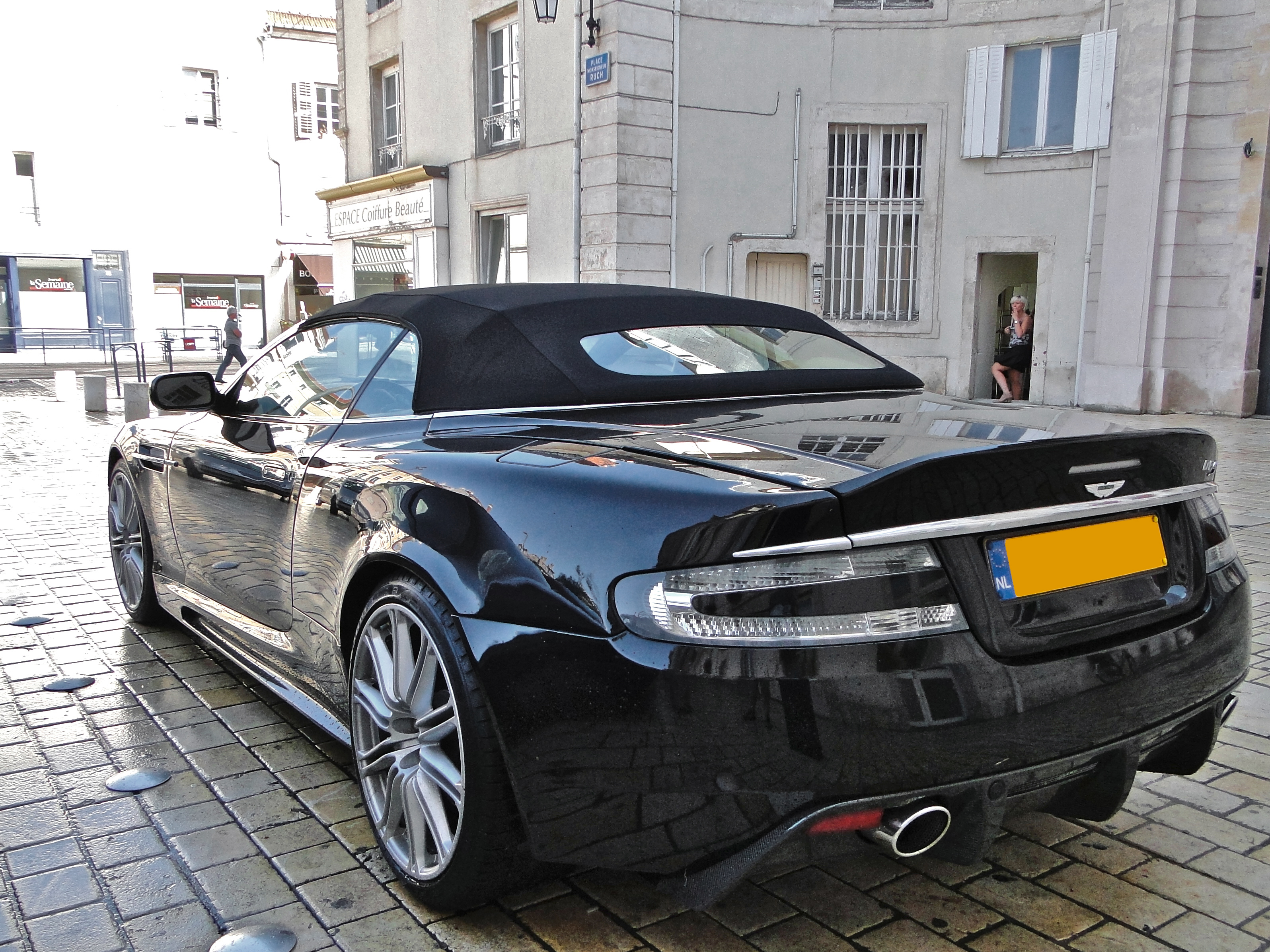 Caractéristiques Constructeur : Aston Martin Années de production : 2009 - Moteur et transmission Moteur : V12 Cylindrée : 5 935 cm3 Puissance maximale : 517 ch (380 kW) Poids et performances Poids : 1 810 kg Vitesse maximale : 305 km/h Accélération : 0 à 100 km/h en 4,3 s